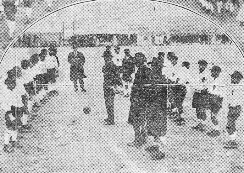 1923년 전국체육대회 축구(제4회 전조선축구대회) 소학부 예선 경기 시작 모습